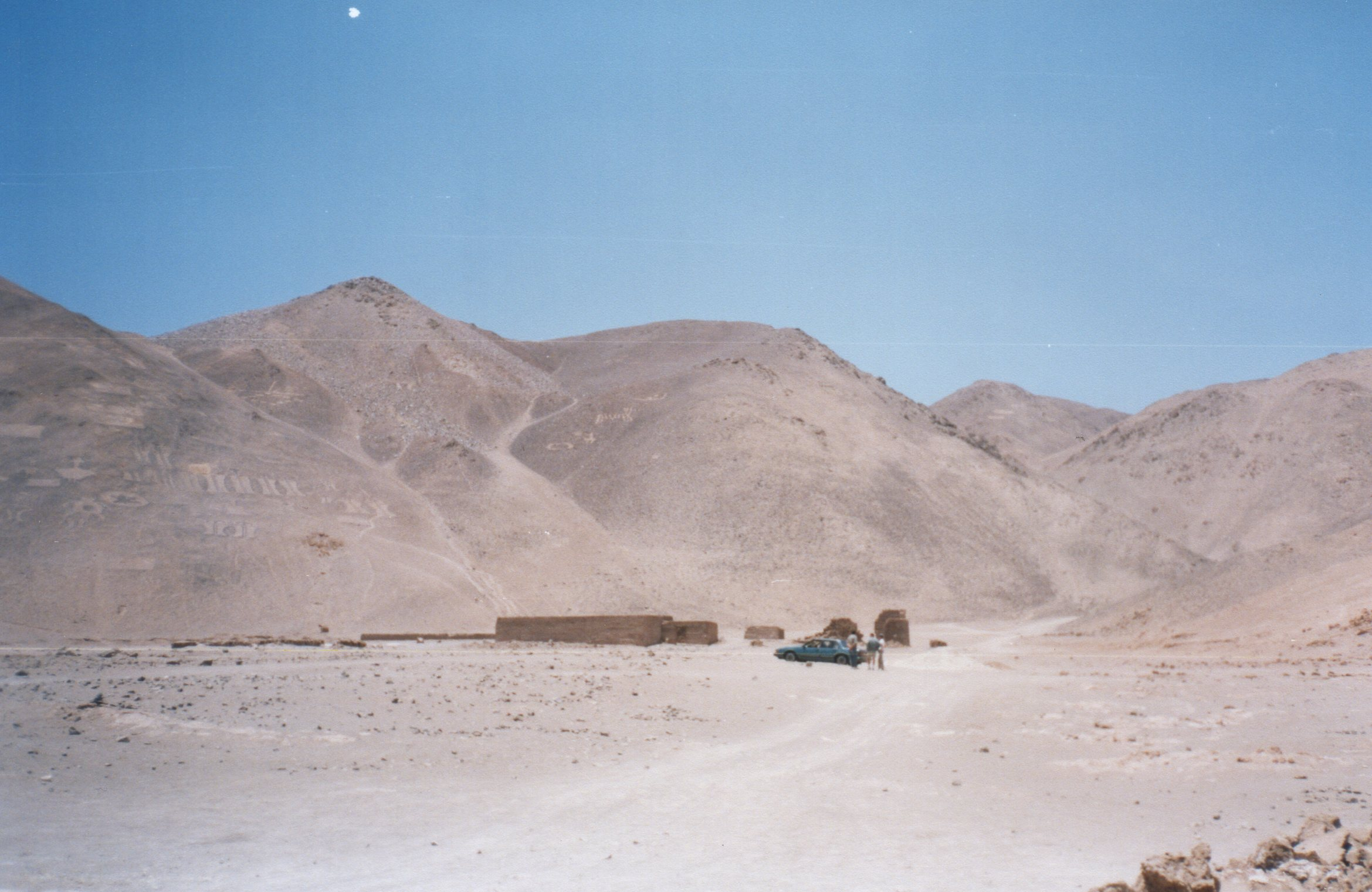 Geoglifos y edificaciones en Pintados (Chile), al sureste de Iquique.